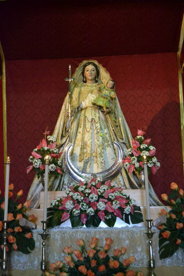 Nuestra Señora de Candelaria. Siglo XIX. Parroquia Matriz de Nuestra Señora de Candelaria. Eduardo Duque.